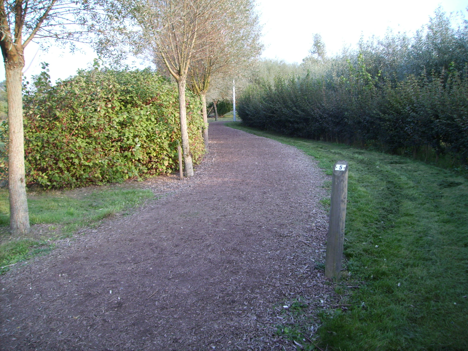 Finse piste Oudenaarde